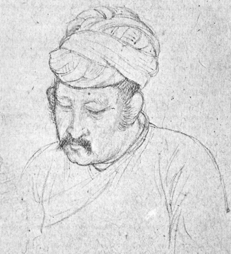 Der Großmoguln Akbar (* 1542 / † 1605), Zeichnung von ca. 1605.